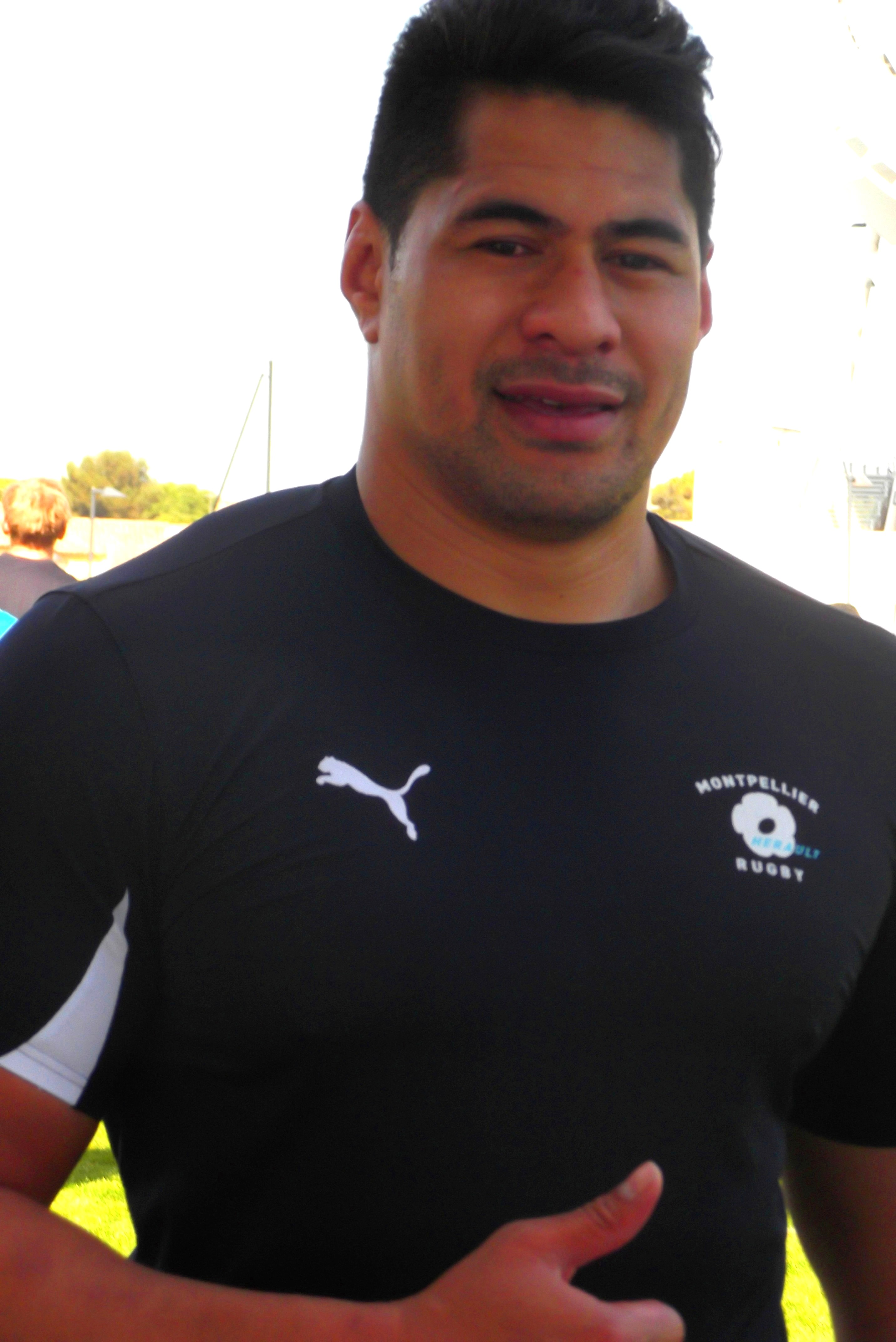 Alex Tulou, avril 2013.